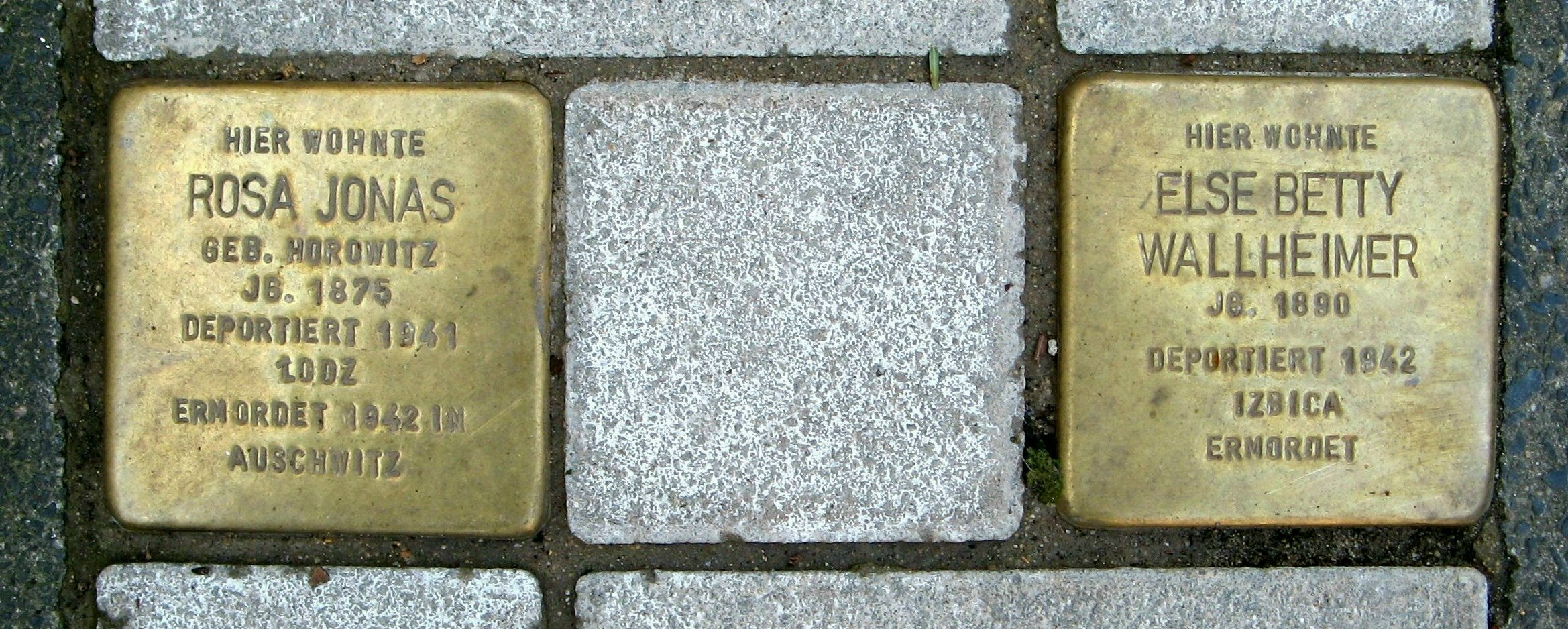 Stolpersteine für Rosa Jonas und Else Betty Wallheimer, Mozartstraße 9, Mönchengladbach, Deutschland, gesetzt im Januar 2008